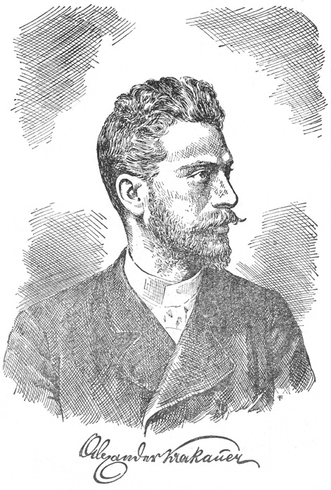 Alexander Krakauer; Zeichnung eines unbekannten Künstlers: Monogrammist „F“)